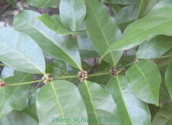 Polysphaeria multiflora